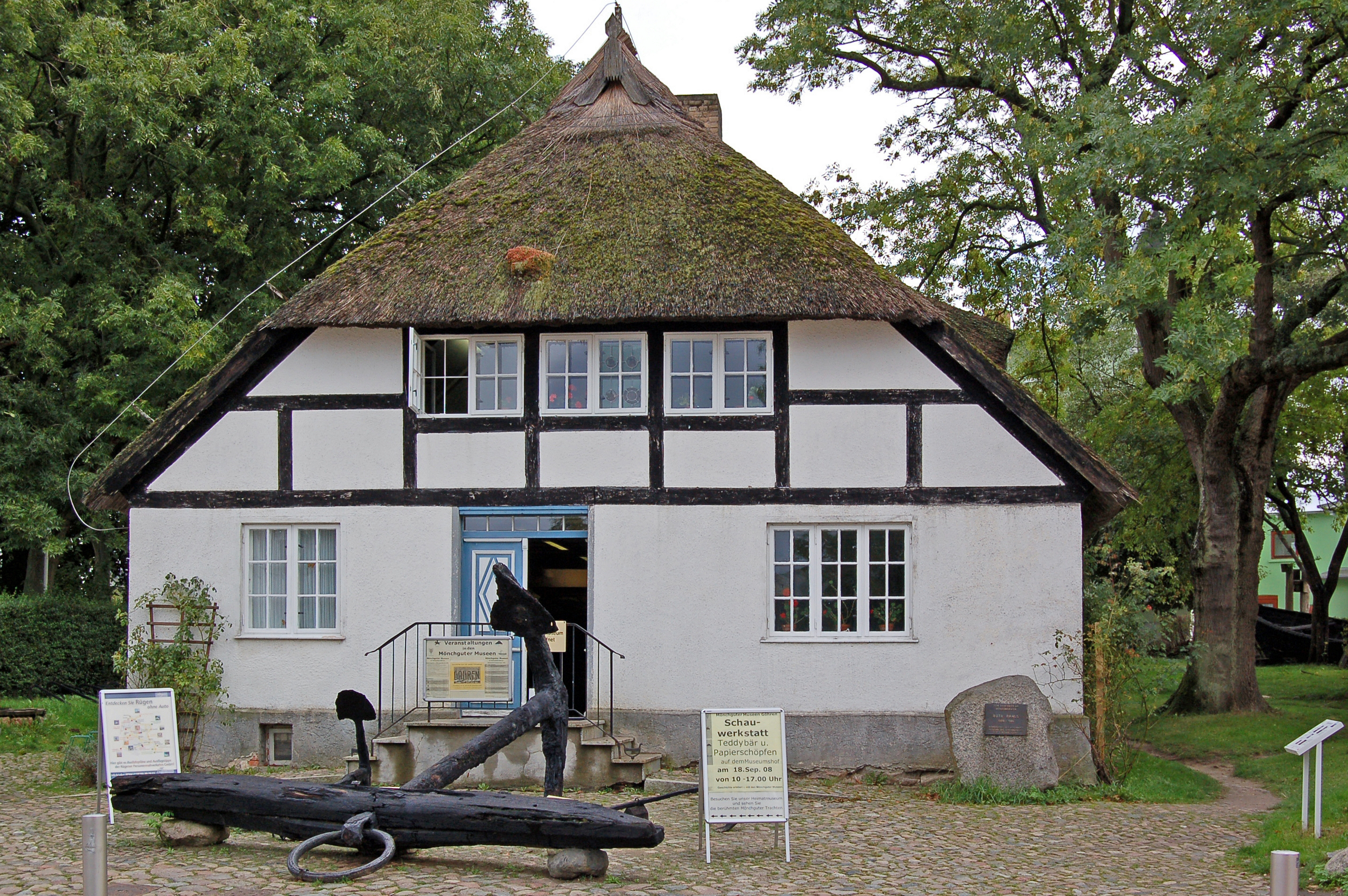 Die Gemeinde Göhren liegt auf der Halbinsel Mönchgut im Südosten der Insel Rügen. Göhren wurde 1165 erstmals erwähnt. Ab 1326 Teil des Fürstentums Rügen. Ab 1648 gehörte Rügen zu Schwedisch-Pommern. Göhren entwickelte sich im 19. Jh. zu einem der bedeutendsten Ostseebäder. Der Bau einer Schmalspurbahn sorgte ab 1899 zu einer weiteren Entwicklung des Tourismus. Zu den Sehenswürdigkeiten des Ortes gehören die Seebrücke, mehr als 5 km langer und 30 m breiter Strand und natürlich die sog. Bäder-Architektur. Haupteinnahmequelle ist natürlich der Tourismus. Fischerei spielt keine große Rolle mehr. Seit der »Wende« wurde viel renoviert - vor allem die in der Bäder-Architektur errichteten Bauten wurden mit viel Liebe restauriert.